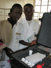 Das Minilab im Einsatz in Afrika